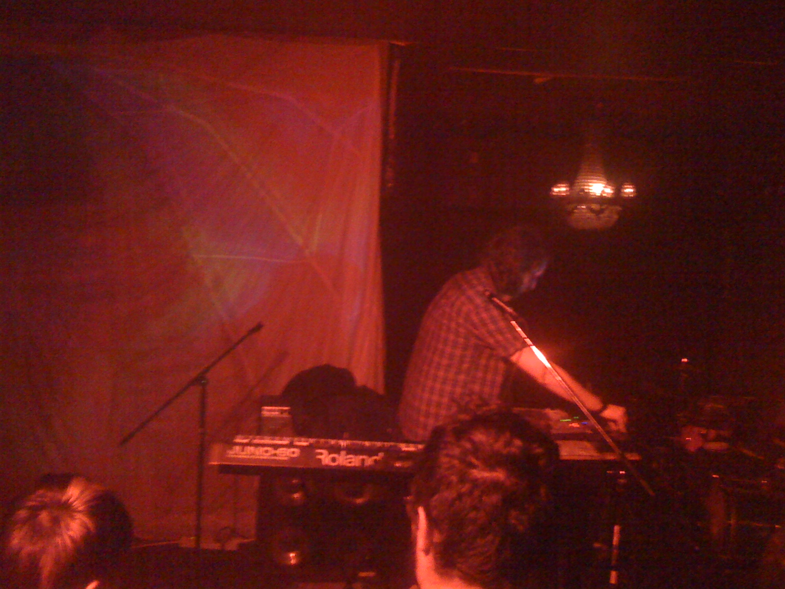 oneohtrix